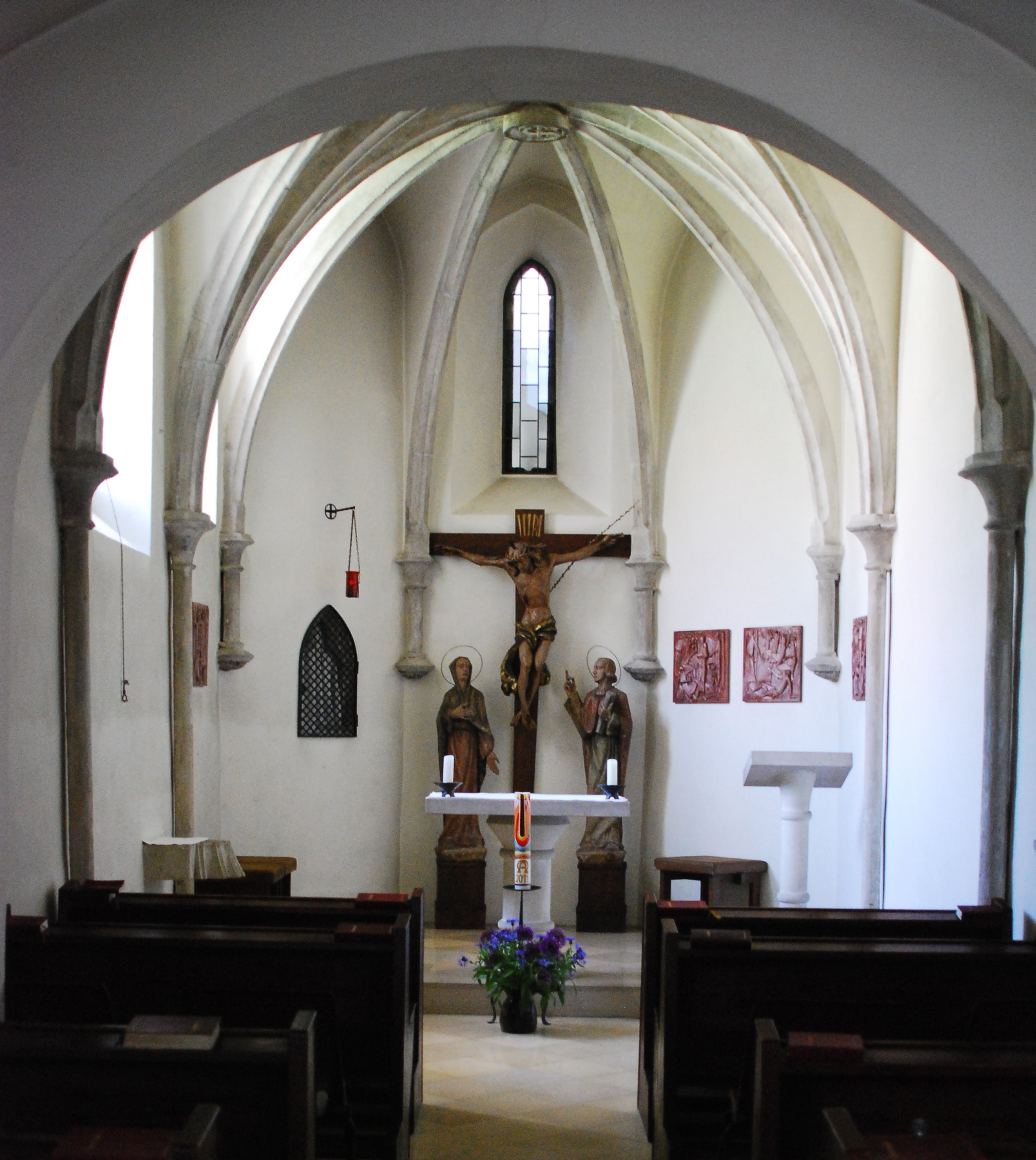 Kapelle in der Pfarrkirche von Hollabrunn in Niederösterreich